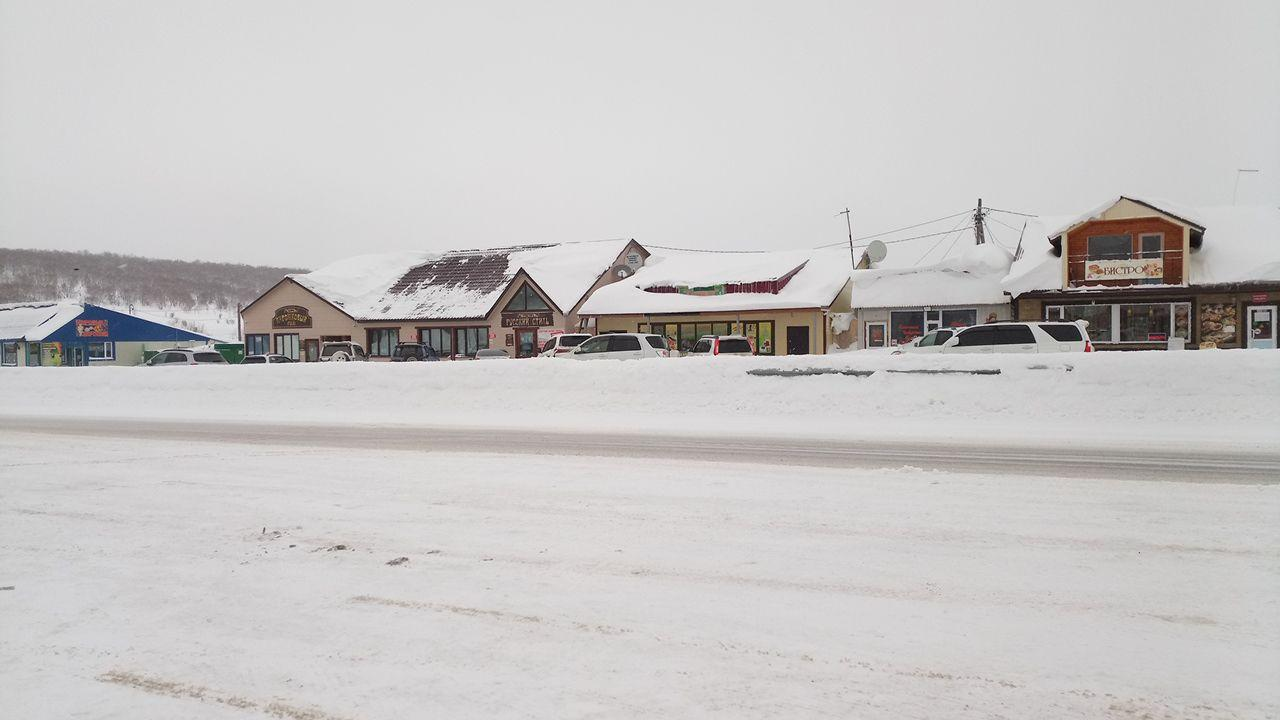 Вид на стоянку автотранспорта и ряд магазинов, кафе, закусочных.